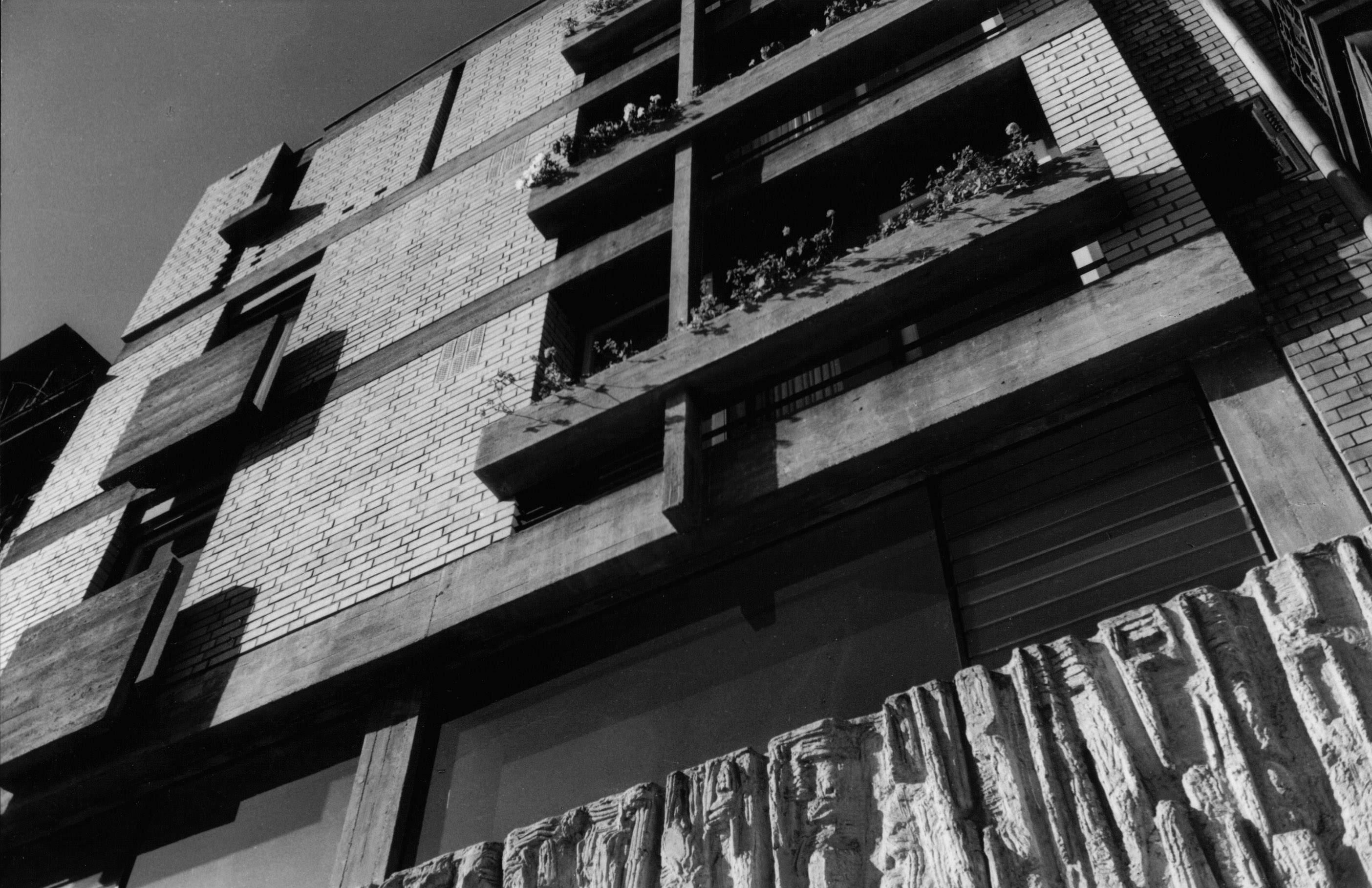 Strassenansicht E7, 7 Foto J. Langner